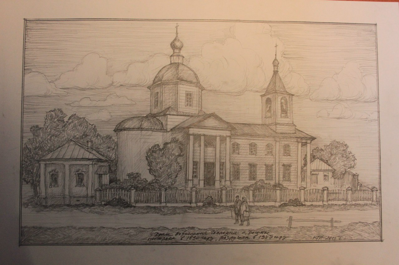 эскиз старого храма села Богатое, разрушенного в 1937 году. Рисунок сделан на основании свидетельств очевидцев.